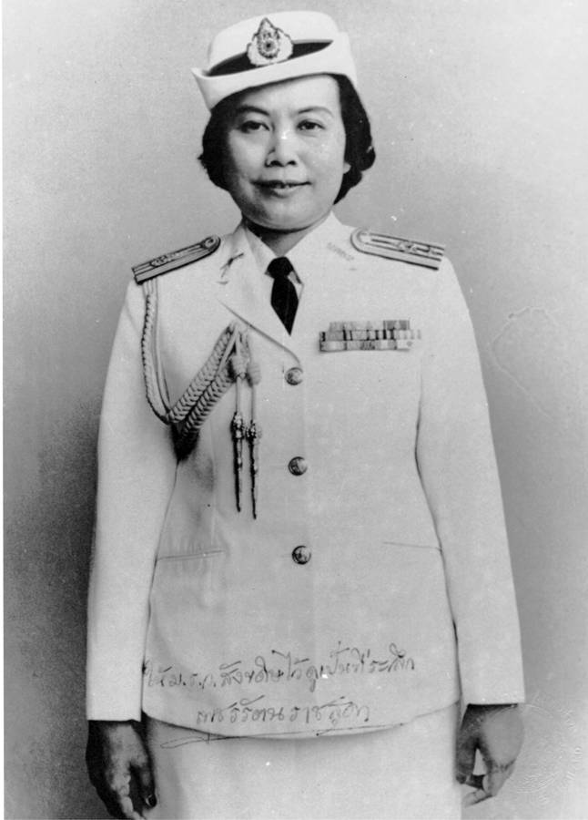 สมเด็จพระเจ้าภคินีเธอ เจ้าฟ้าเพชรรัตนราชสุดา สิริโสภาพัณณวดี